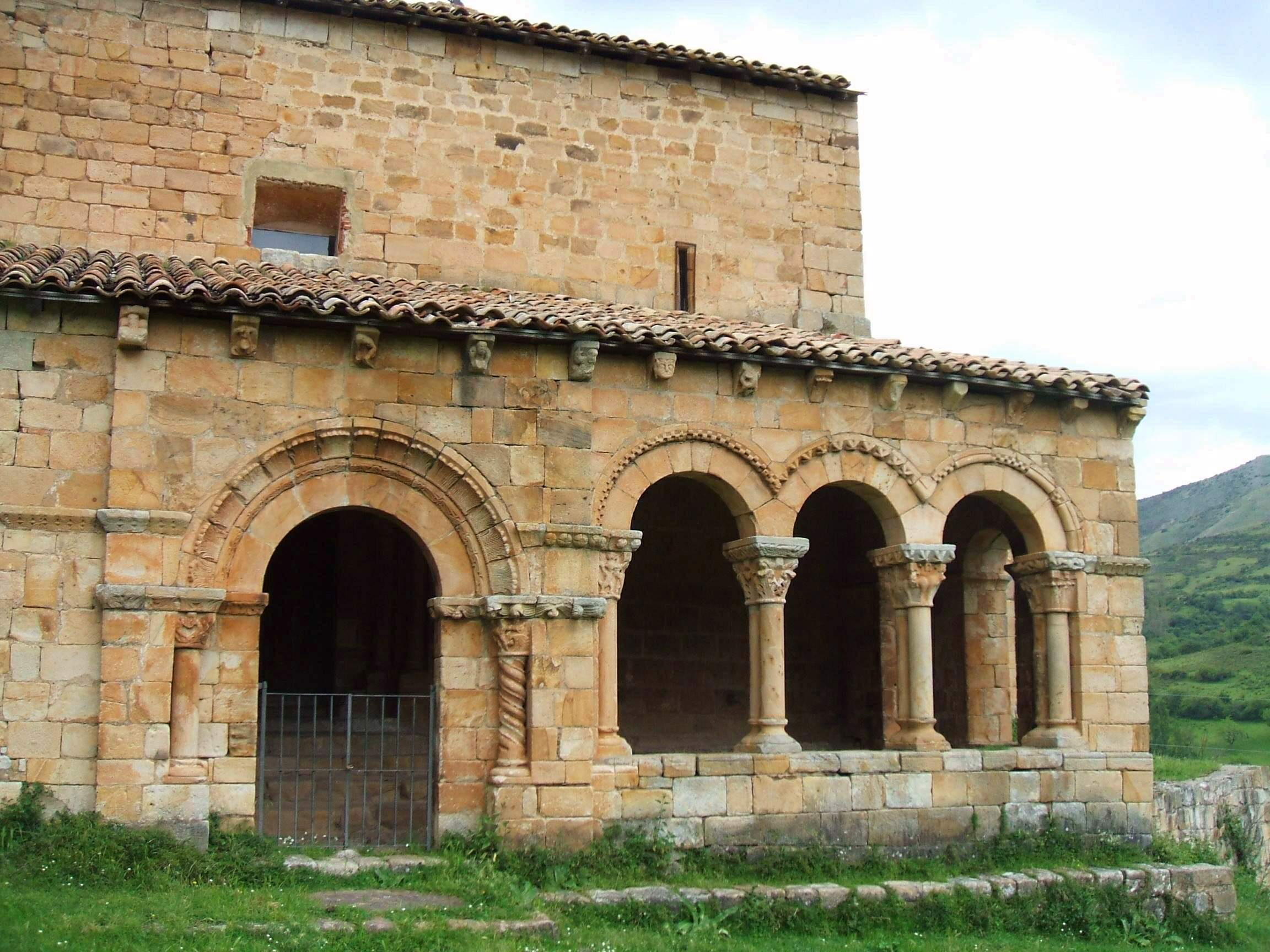 Ermita románica de San Cristóbal, en Canales de la Sierra (La Rioja)